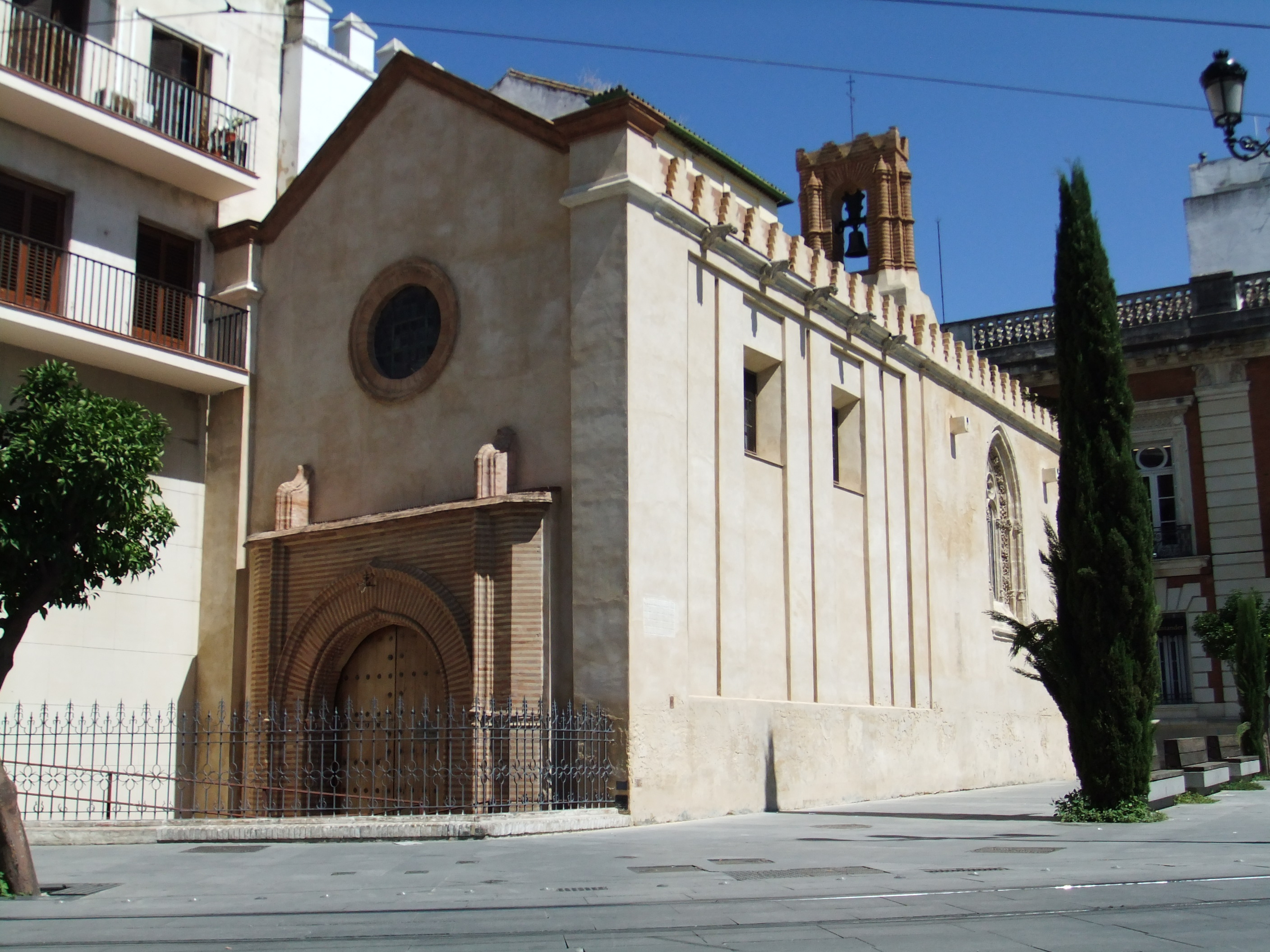 Portada y lateral de la Capilla de Santa María de Jesús, construida a principios del siglo XVI para la primitiva Universidad de Sevilla